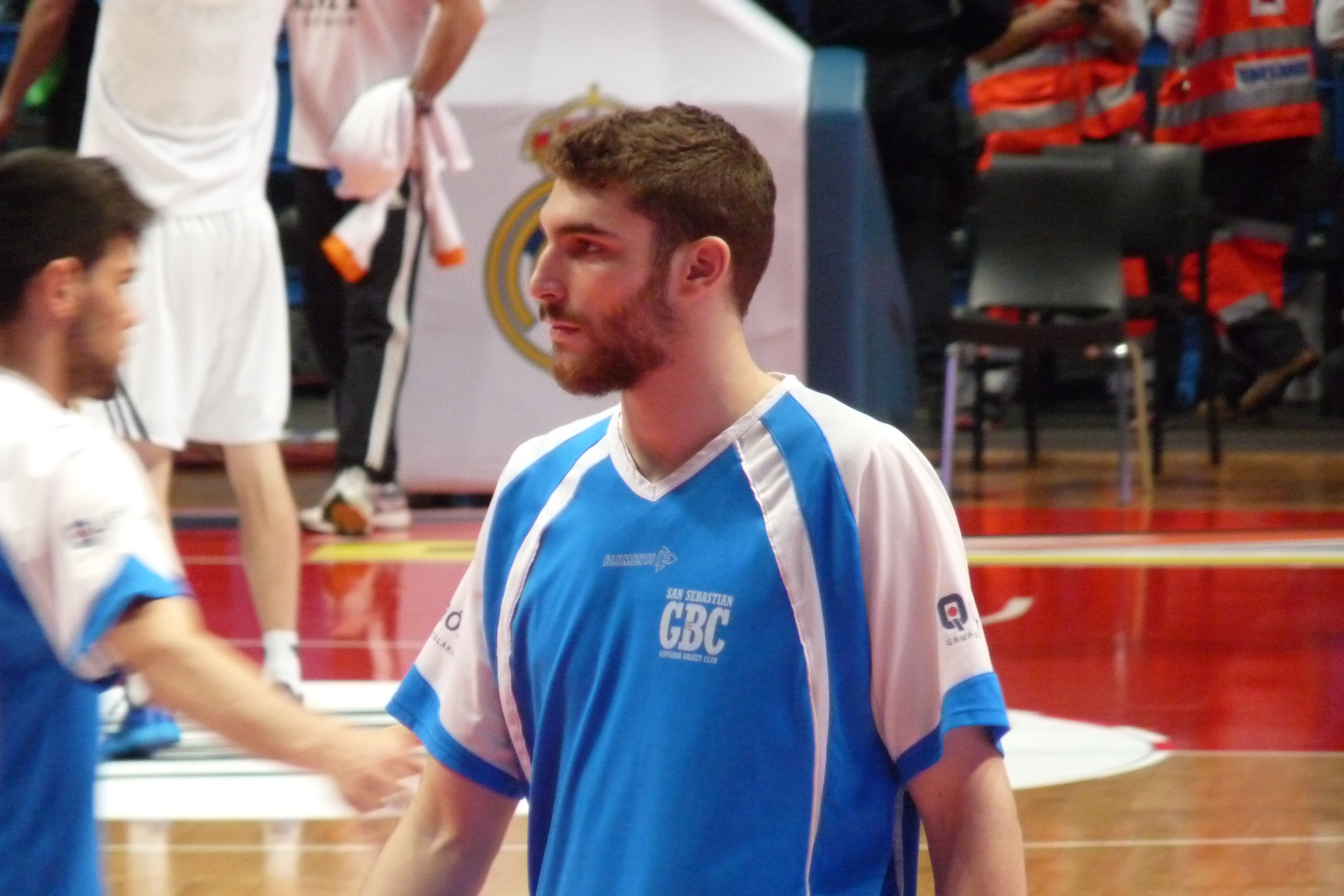 Julen Olaizola en partido Real Madrid-San Sebastián, año 2014